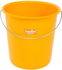 Balde amarelo.